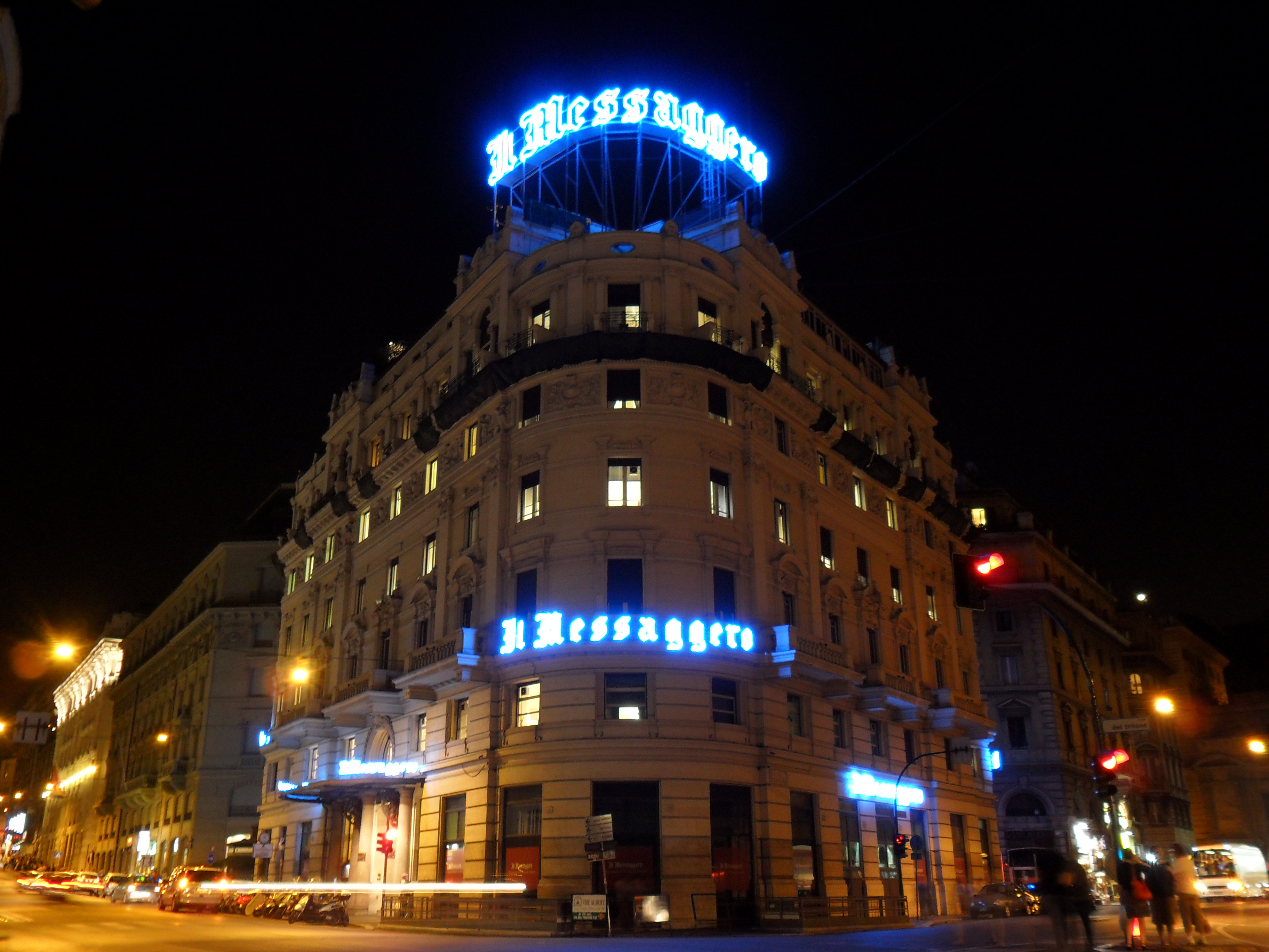 Palazzo del Messaggero, via del Tritone